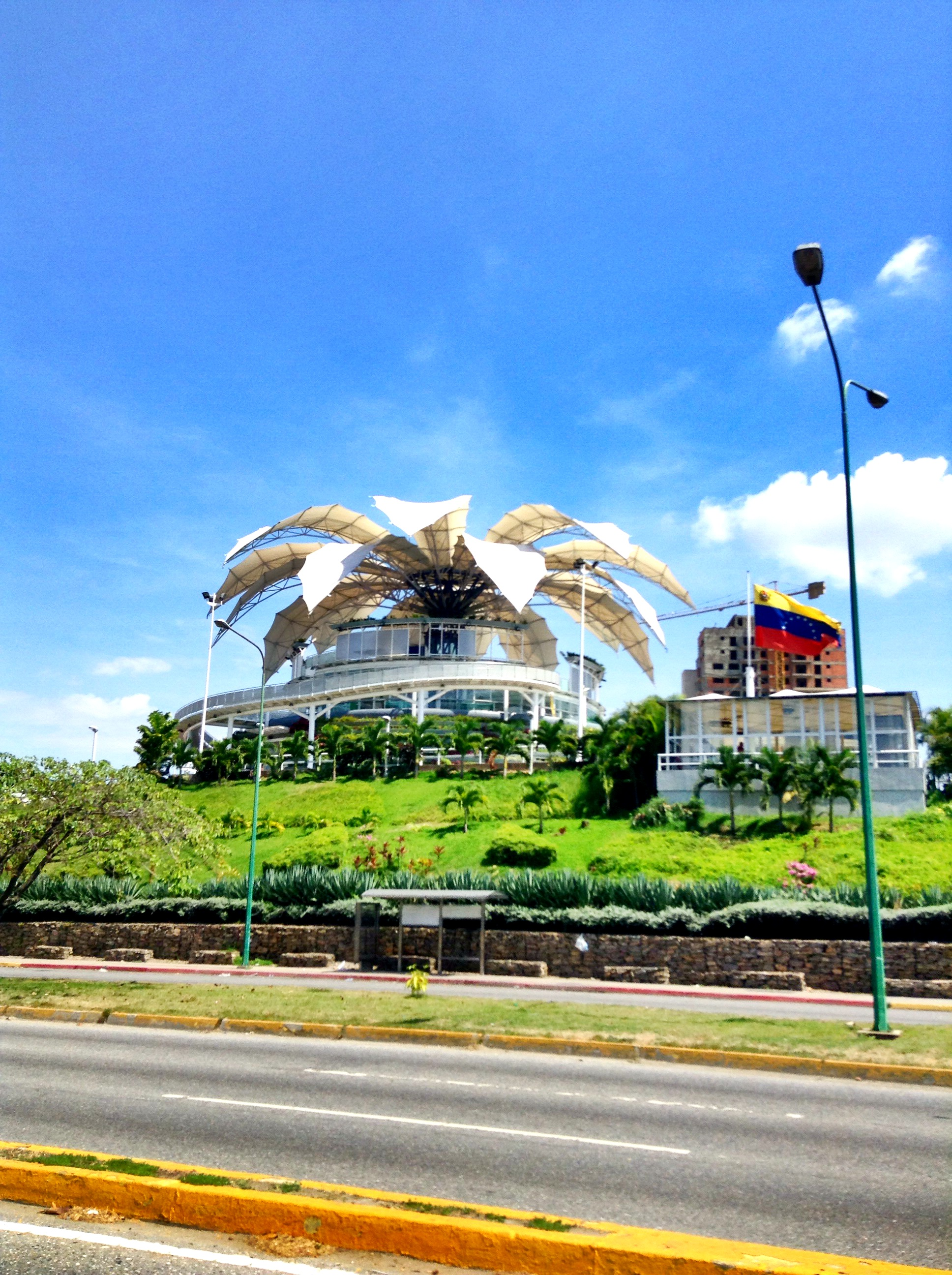 Excelente destino para la familia, Esta estructura fue el Pabellón de Venezuela en la expo mundial de Hannover en el año 2000. Se dice que la estructura de tres niveles, ubicada en Barquisimeto estado Lara, con una bóveda de 16 pétalos que se abren y cierran sobre un “tallo” hidráulico de 19 metros de altura, será uno de los pabellones más imaginativos de la muestra. Diseñada por el renombrado arquitecto venezolano Fruto Vivas y titulada “Una flor para el Mundo”, la estructura se inspira en los monolíticos tepuyes que se levantan imponentes en medio del paisaje de la Gran Sabana, así como en la flor nacional de Venezuela, la orquídea. Cuando está abierta, o en plena florescencia, si se quiere, la flor tiene un diámetro de 39 metros. @Barquisimeto